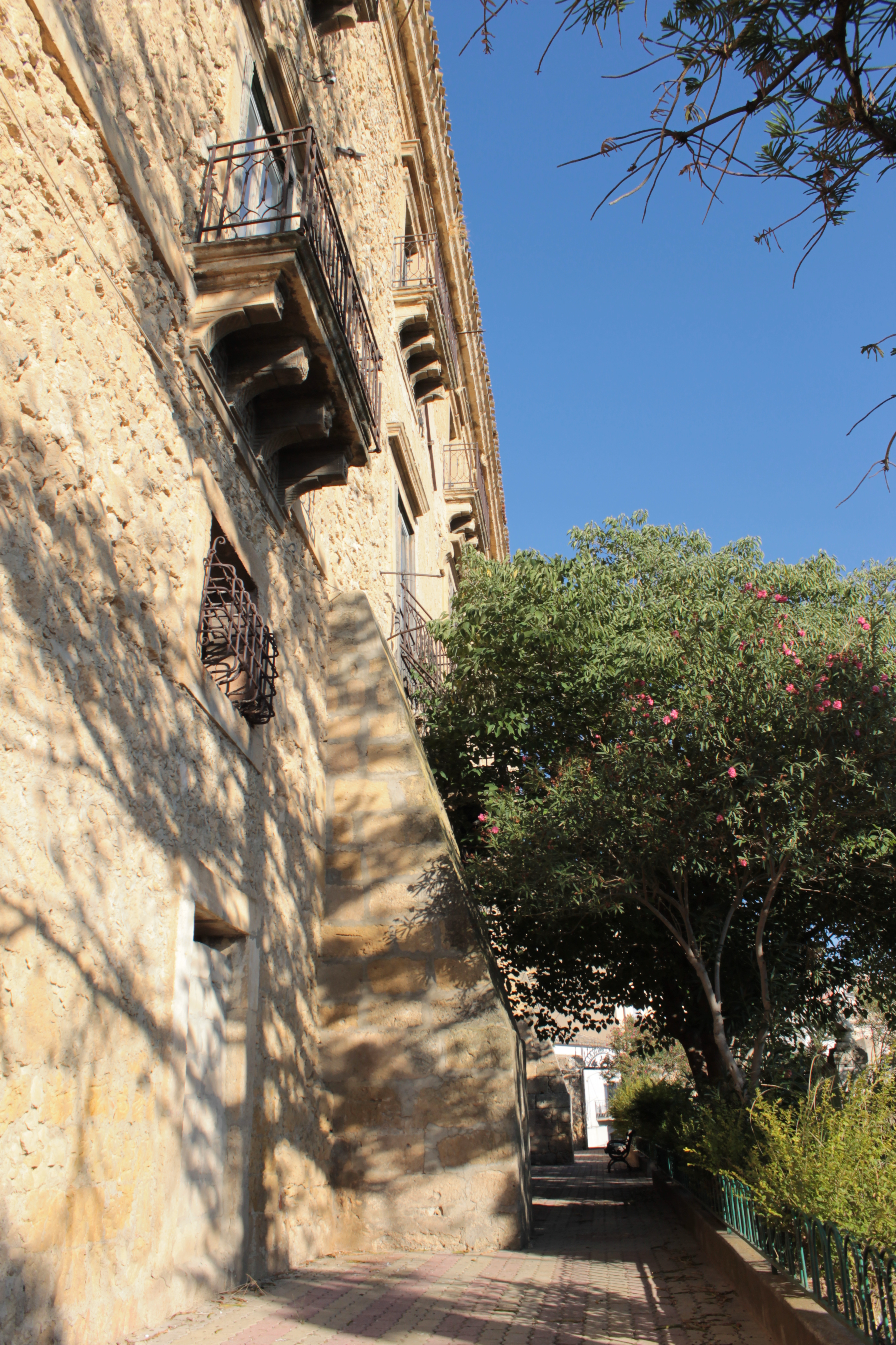 Villa Comunale This is a photo of a monument which is part of cultural heritage of Italy.